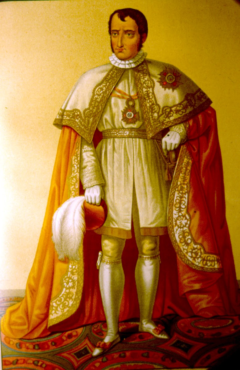 Litografía en color del siglo XIX que representa al rey Fernando VII de España revestido con el traje ceremonial y el manto de la Orden de Isabel la Católica, creada en 1815 por Fernando VII. La litografía procede del libro titulado Historia de las Órdenes de Caballería que han existido y existen en España, publicado en Madrid en 1863 y escrito por Manuel de Íñigo y Miero y S. Costanzo.